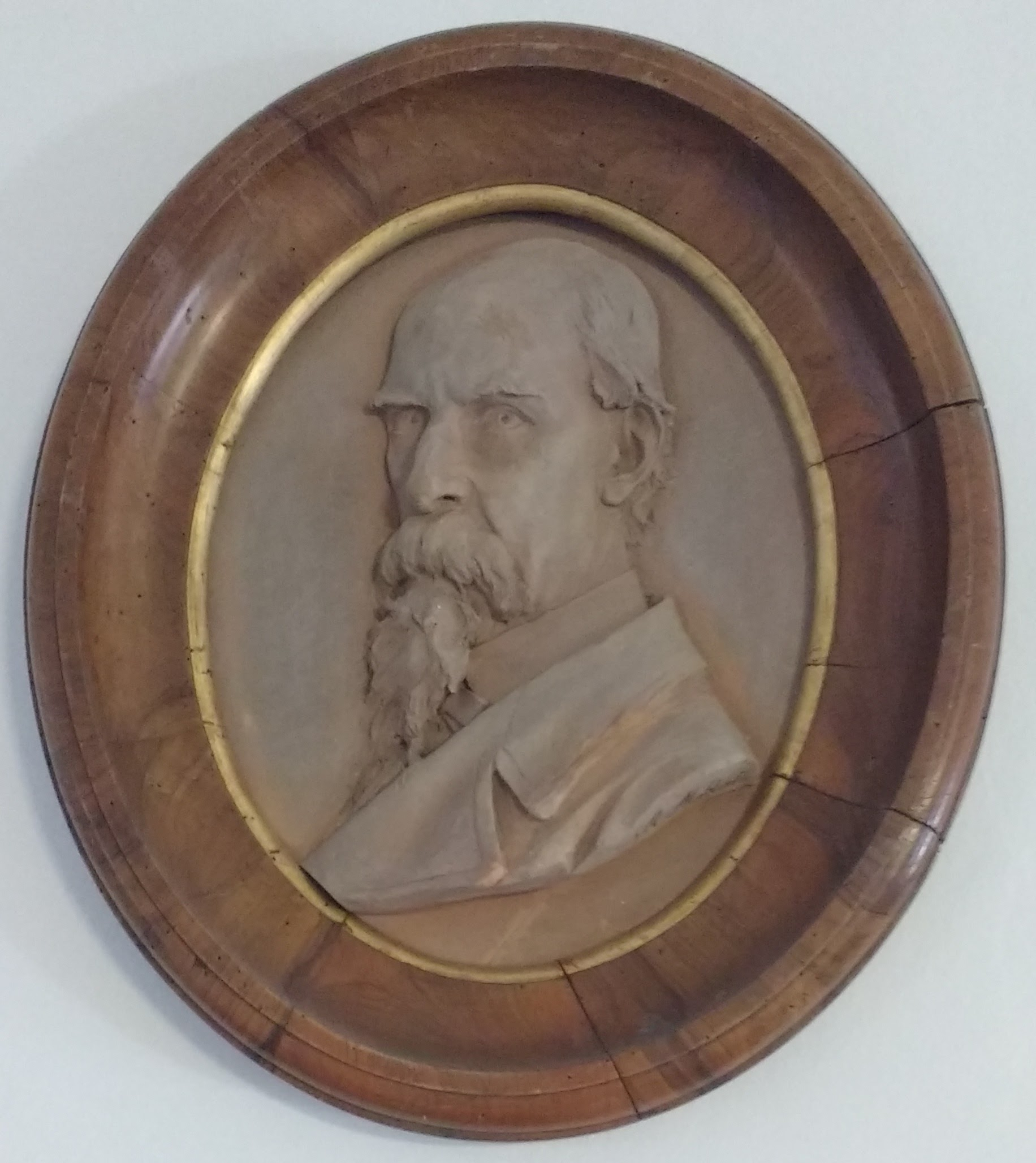 opera di Andrea Malfatti (1832-1917)